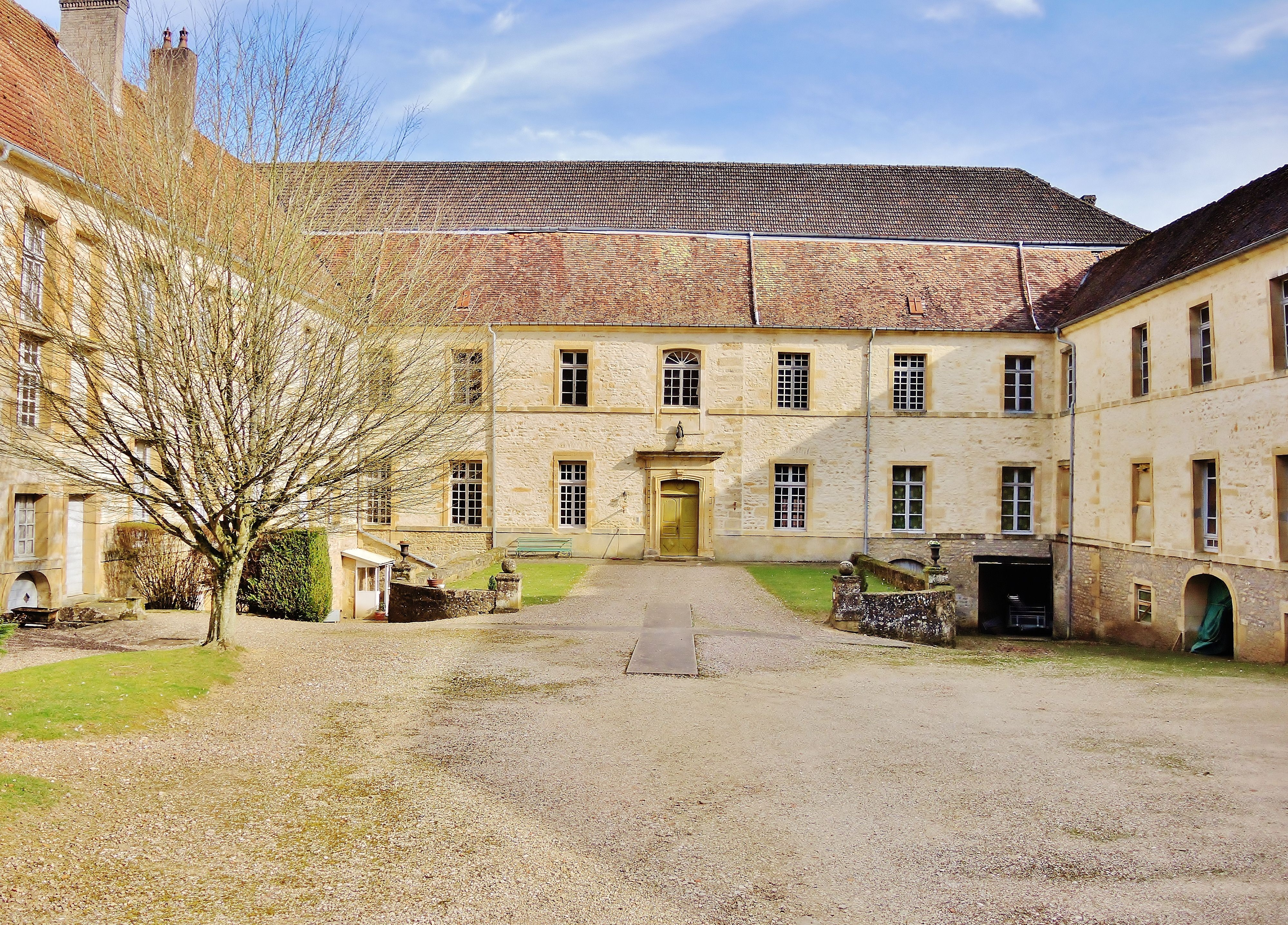 Prieuré de La Roche-Morey